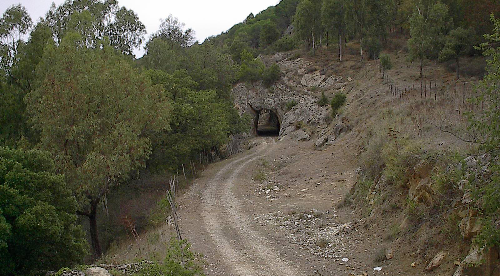 Tratto della pista ciclopedonale realizzata sulla linea dismessa della linea ferroviaria Palermo-Corleone-San Carlo. Territorio comunale di Godrano.